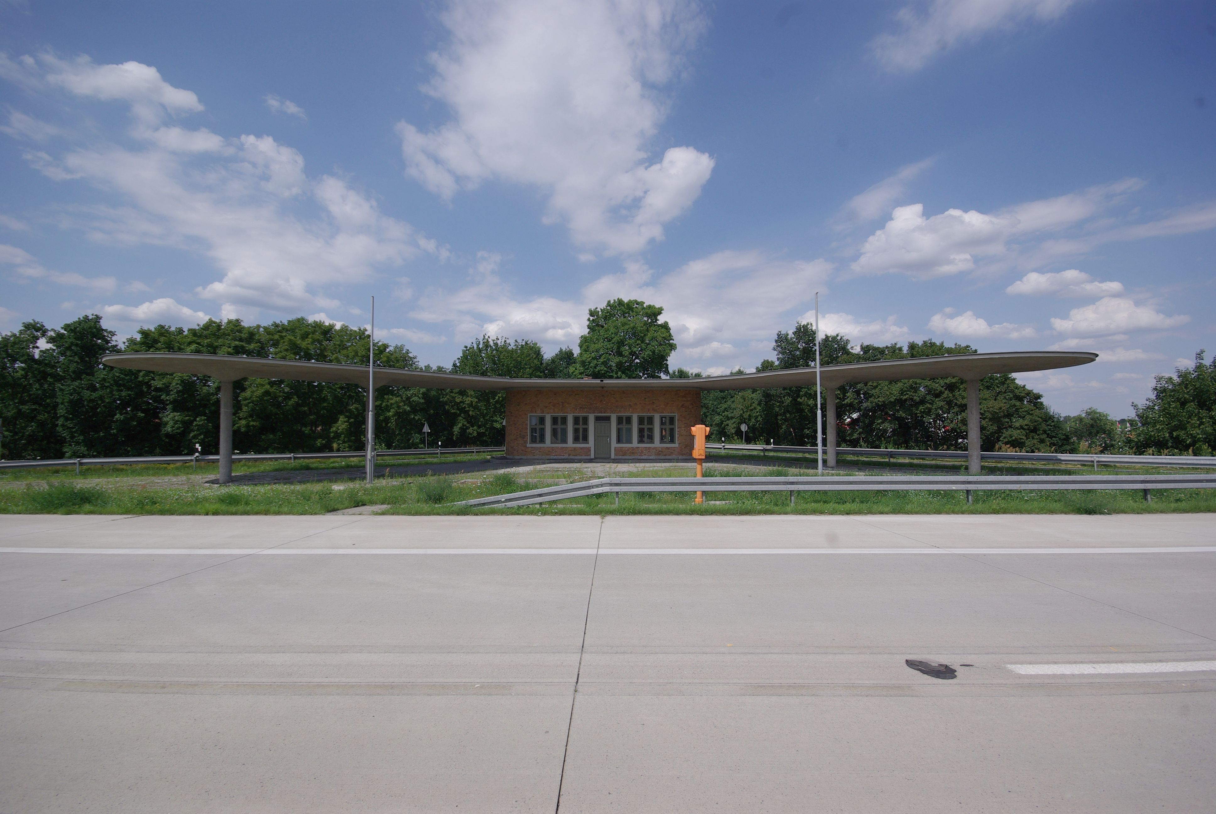 Die Autobahn A12 in Brandenburg im Bereich fürstenwalde/Spree. Die alte Tankstelle an der nördlichen Ausfahrt steht unter Denkmalschutz.